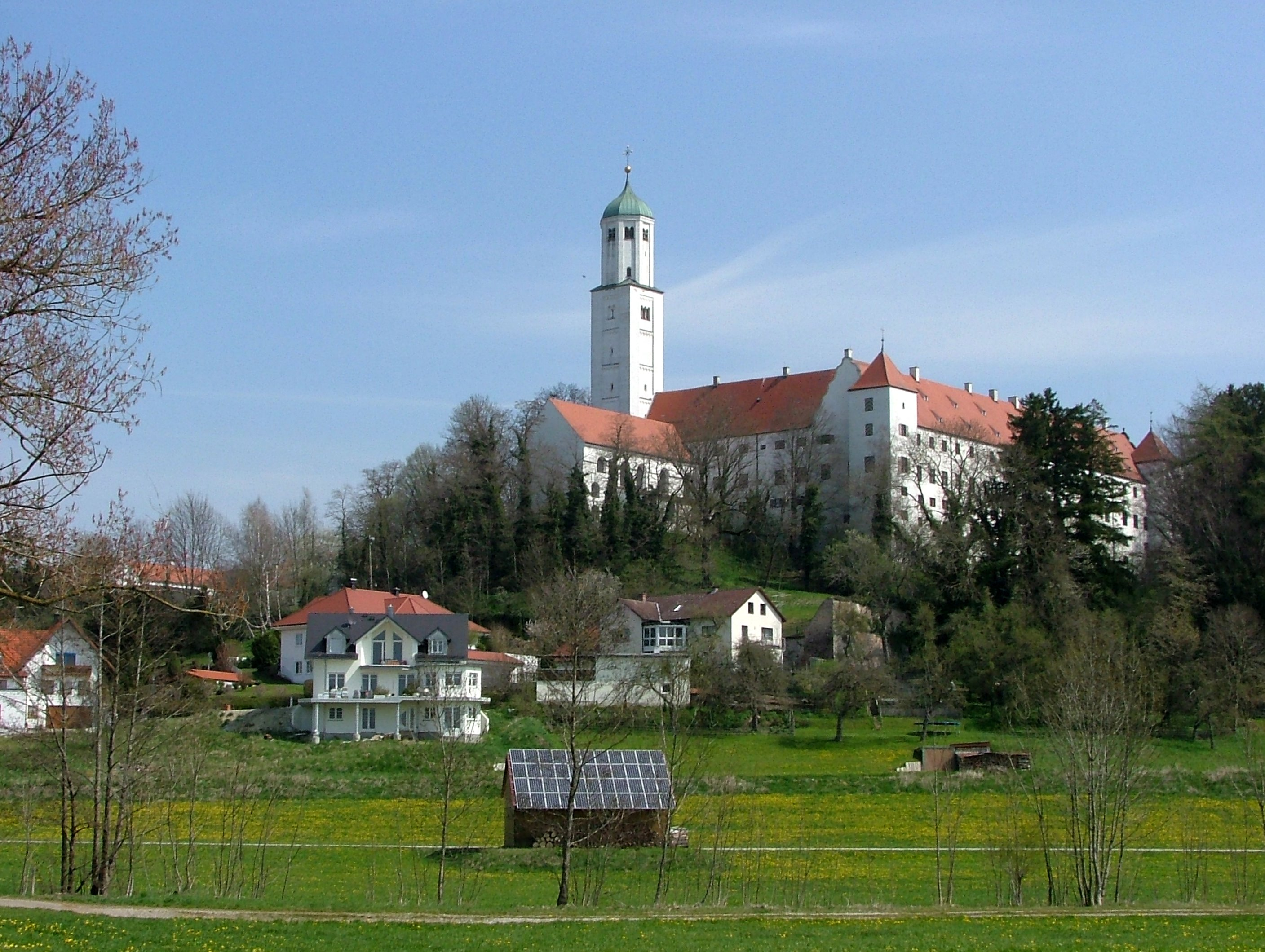 Fuggerschloss